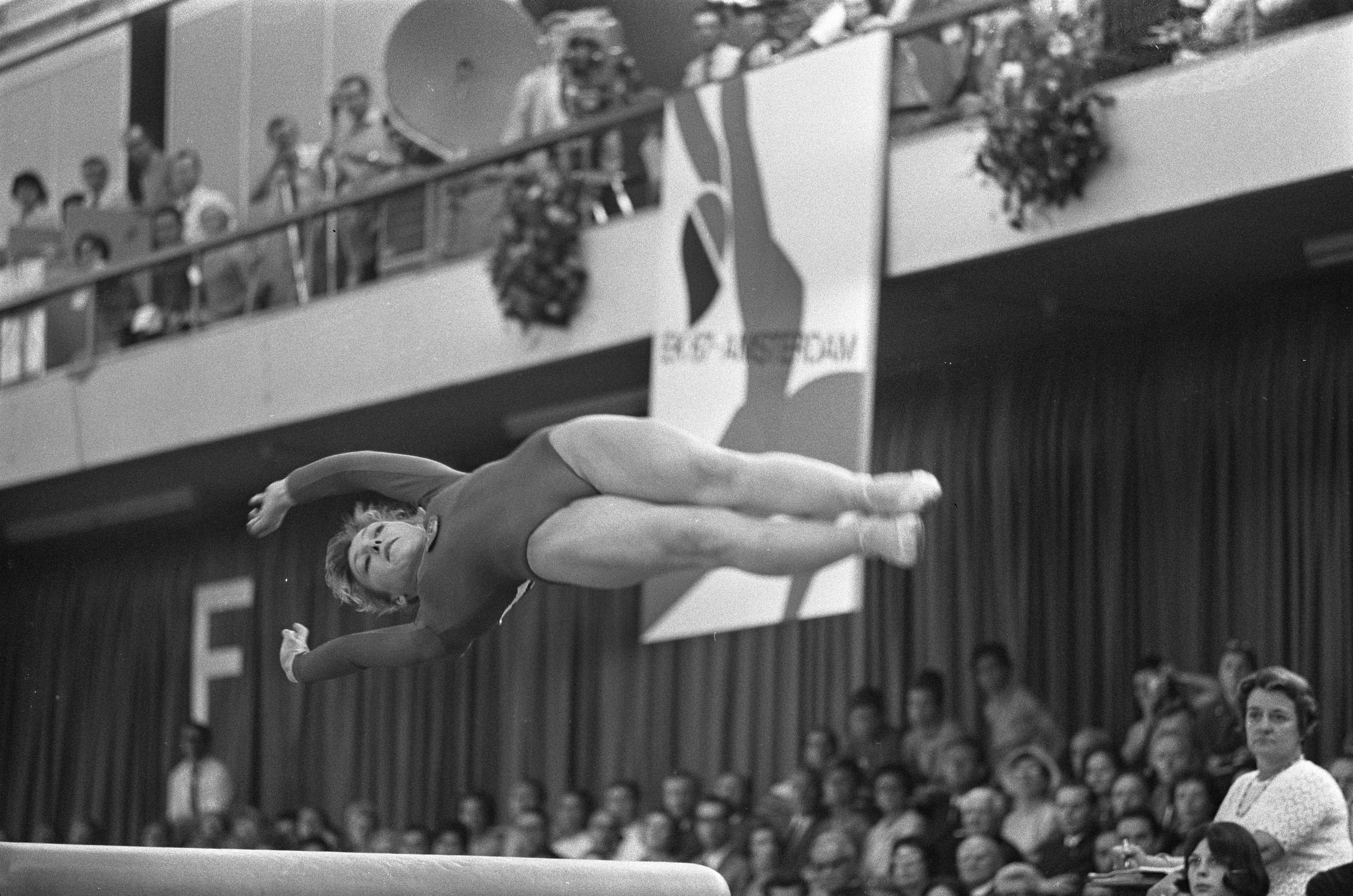 Collectie / Archief : Fotocollectie Anefo Reportage / Serie : [ onbekend ] Beschrijving : Europese turnkampioenschappen, Maria Kraycirovaj op evenwichtsbalk Datum : 28 mei 1967 Trefwoorden : kampioenschappen, turnen Fotograaf : Kroon, Ron / Anefo Auteursrechthebbende : Nationaal Archief Materiaalsoort : Negatief (zwart/wit) Nummer archiefinventaris : bekijk toegang 2.24.01.05 Bestanddeelnummer : 920-3566